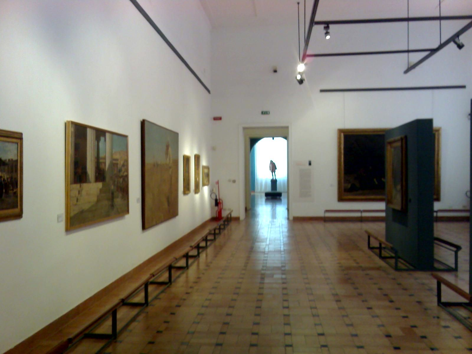 Accademia di Belle Arti di Napoli - La galleria dell'accademia, la sala Novecento